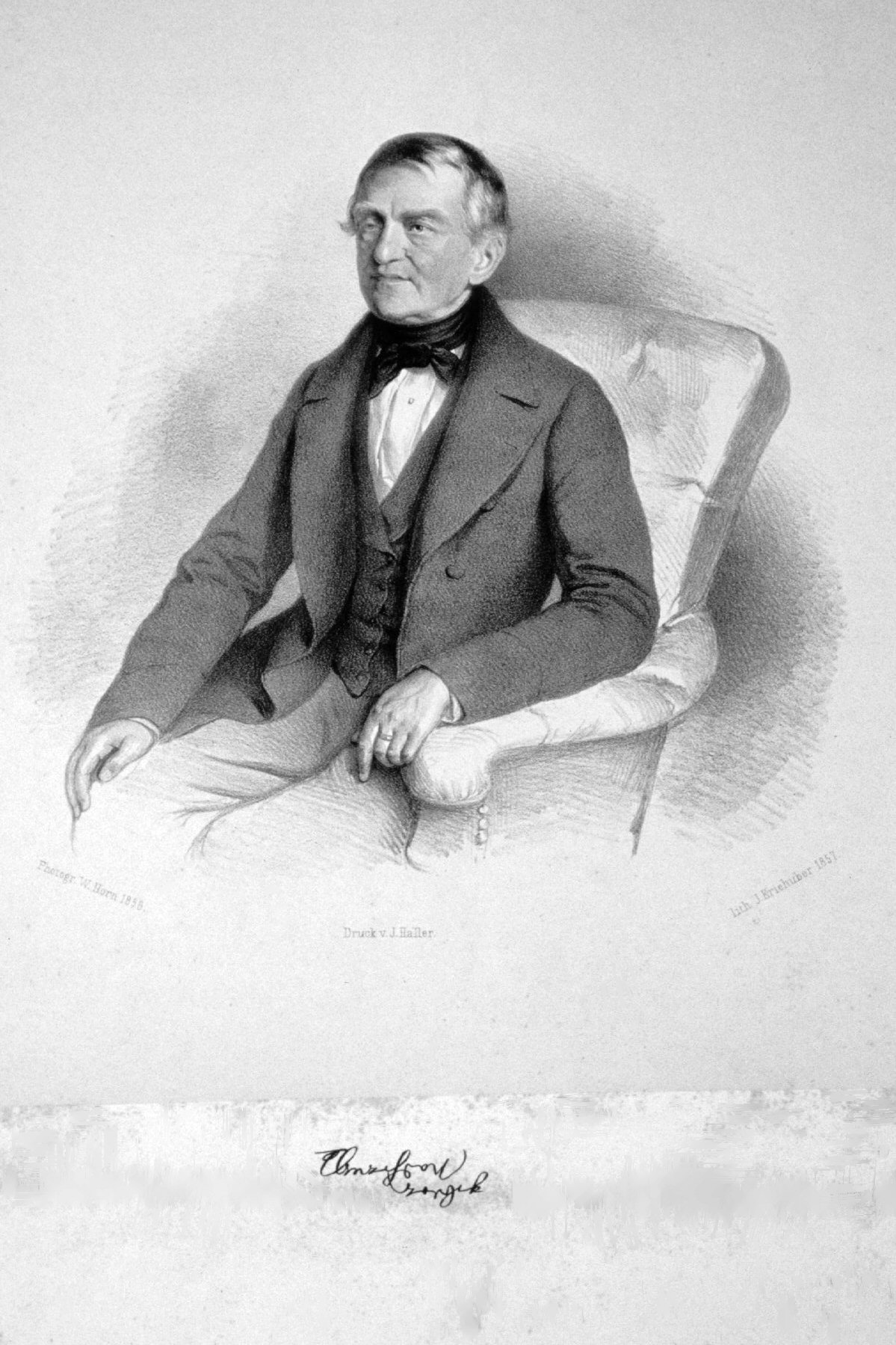 Ignaz Florian von Nadherny (1788-1887), Arzt, Professor an der Universität Prag, Ministerialrat. Lithographie von Josef Kriehuber, 1856